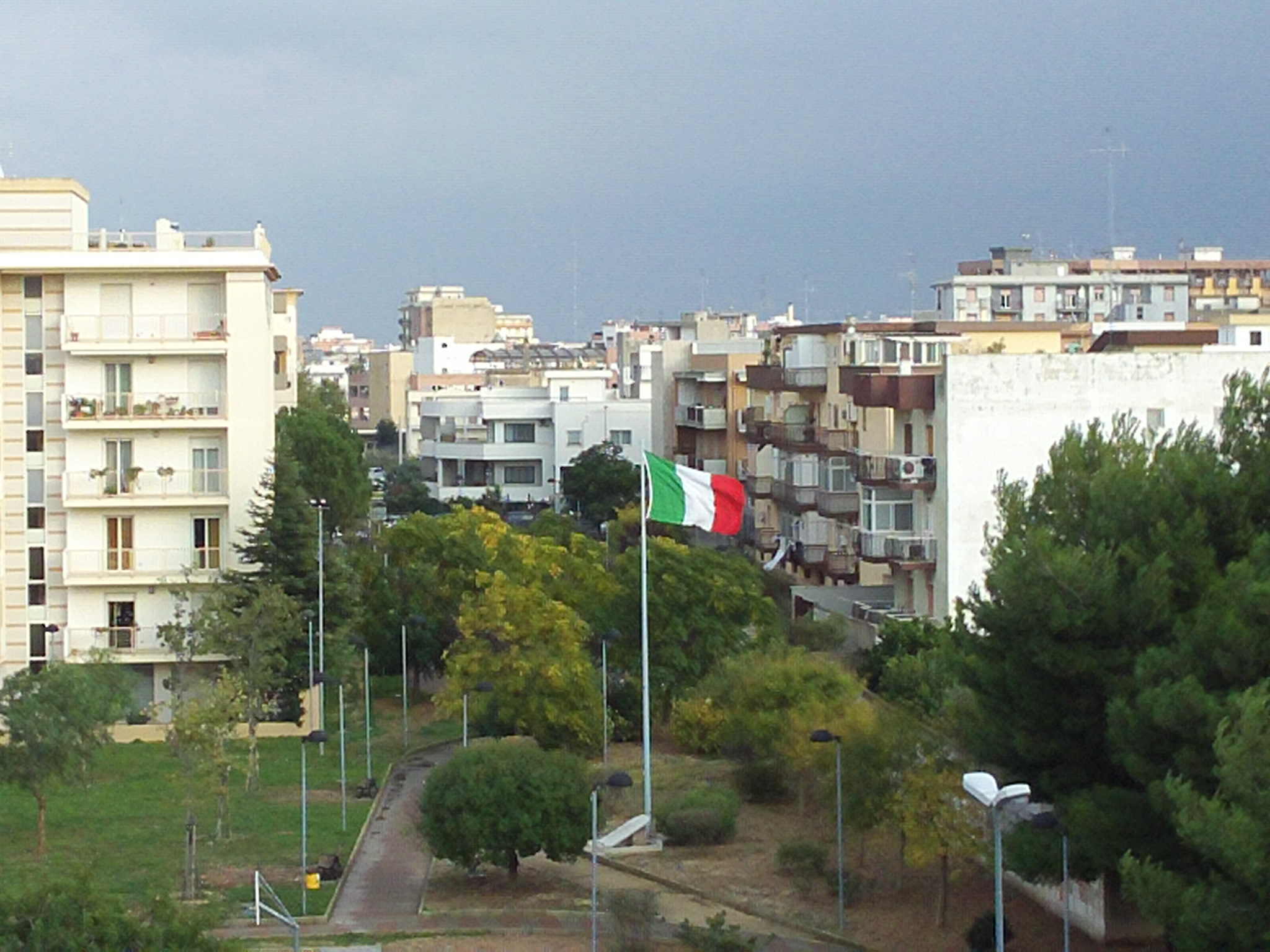 Parco Caduti di Nassiriya di Triggiano (BA) Italy